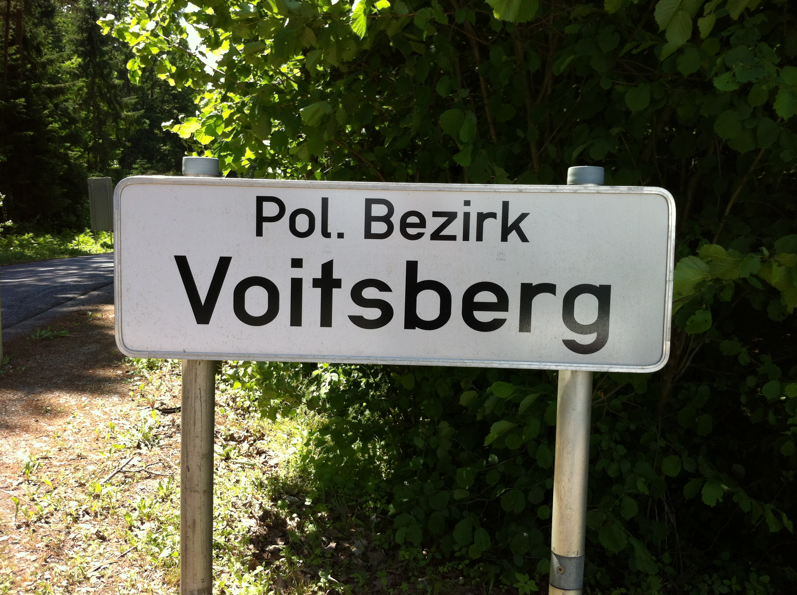 Grenztafel des politischen Bezirks Voitsberg